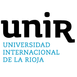 Logotipo Unir